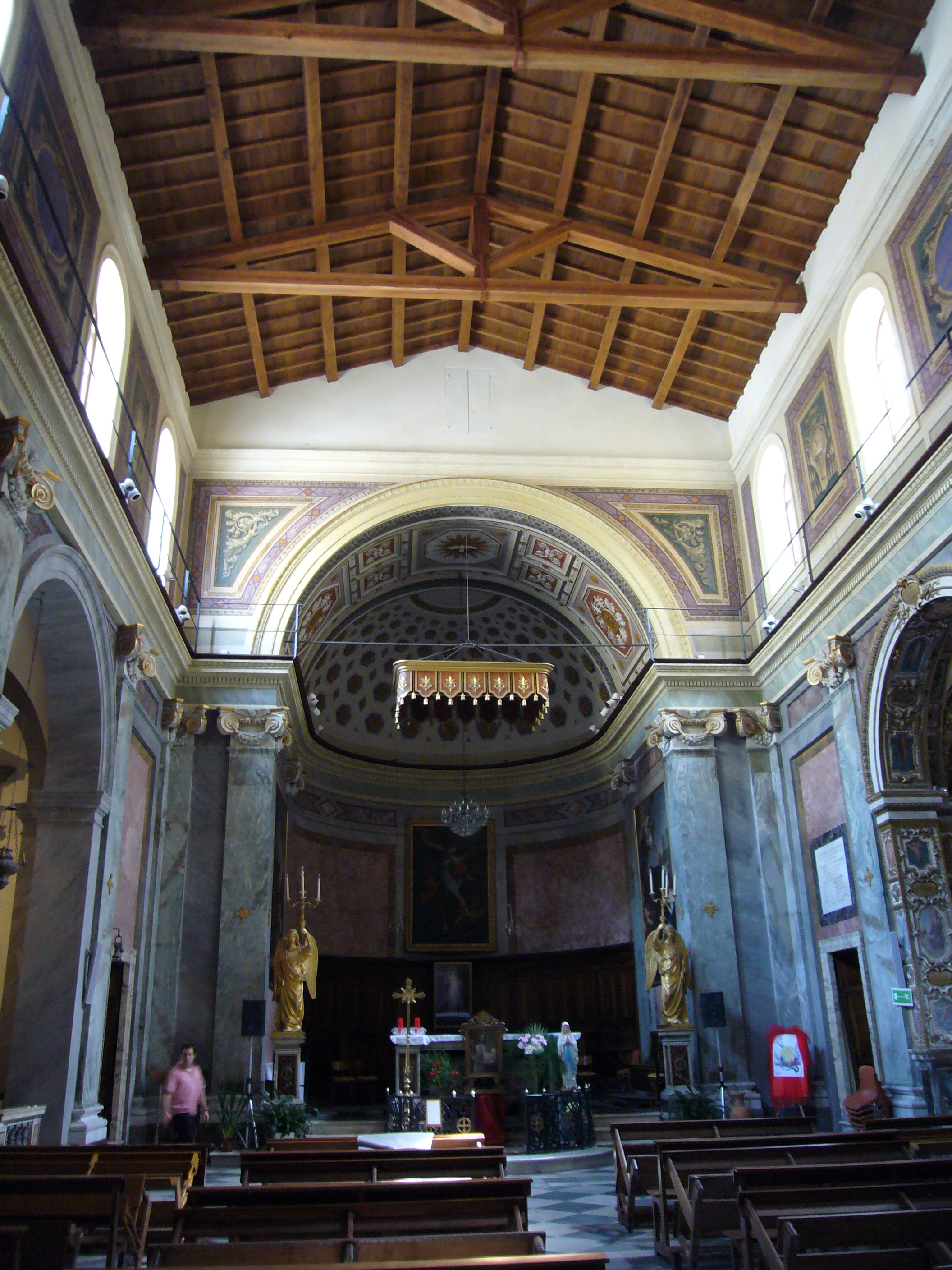 Roma, Sant'Angelo in Pescheria, interno